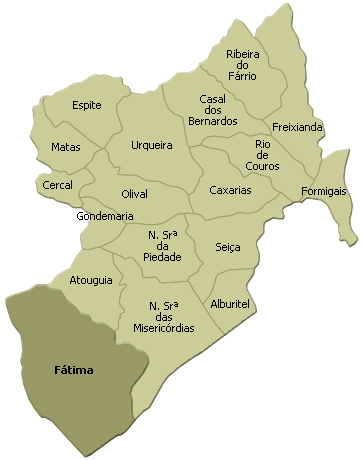 localisation de fatima sur la freguesia de ourem